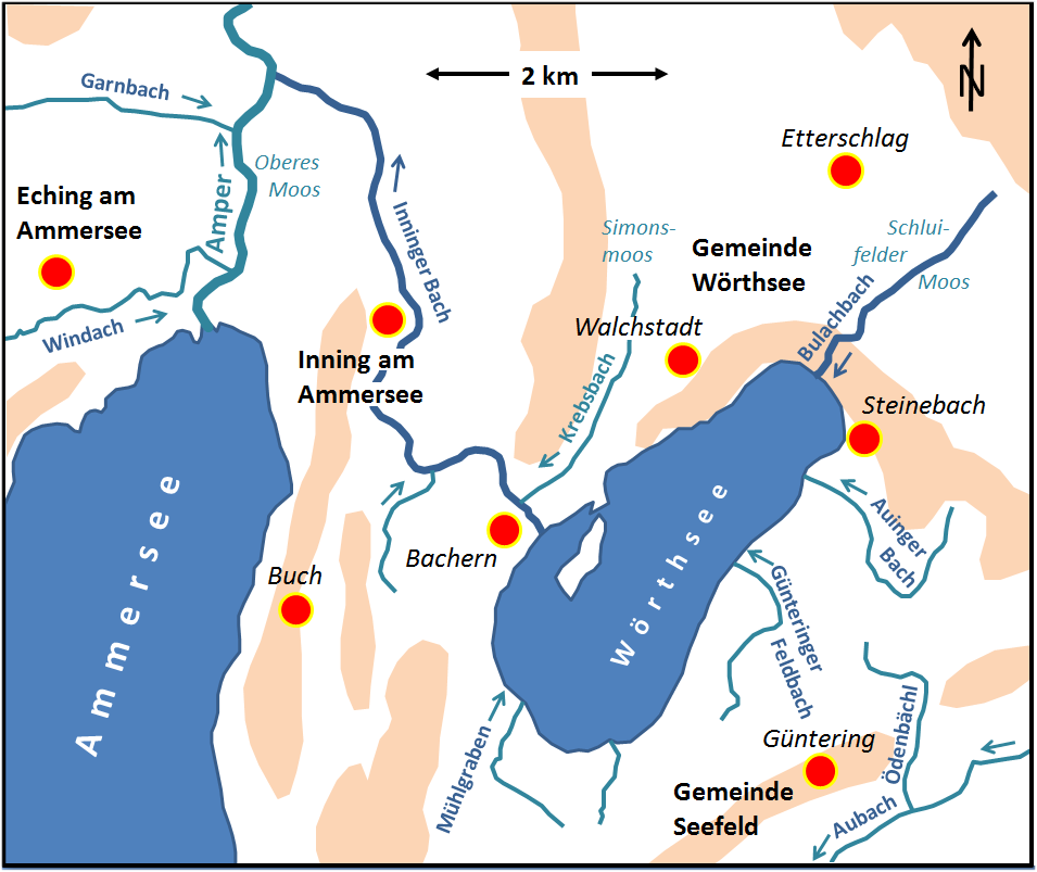 Einzugsgebiet des Inninger Bachs